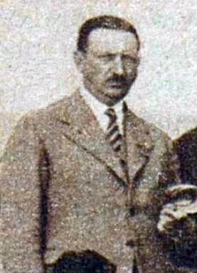 Le Commandant Charles Marion, en août 1932.